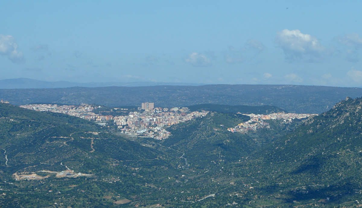 Nuoro seen from Monte Maccione near Oliena, Sardegna